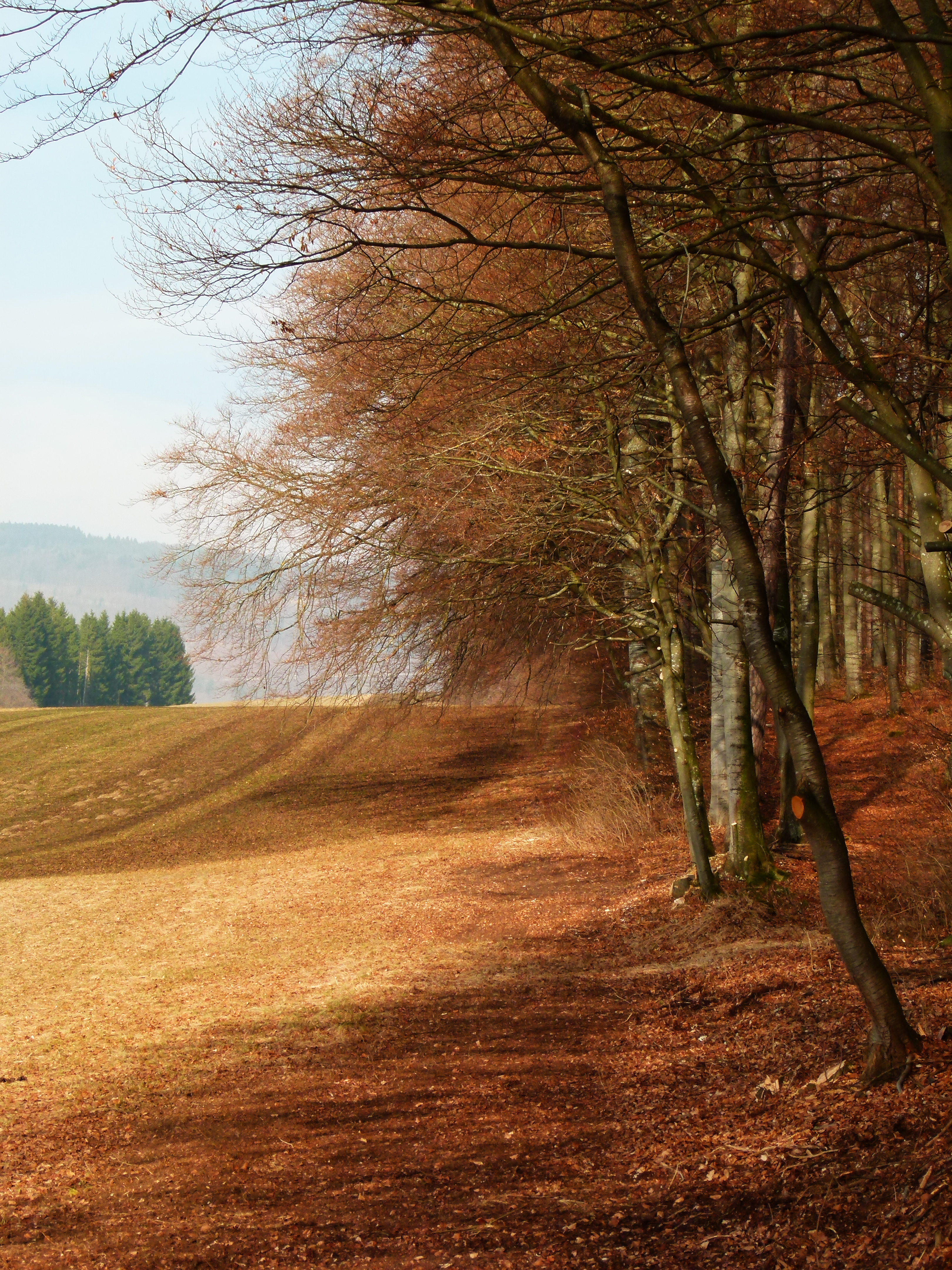 Sewage Farm